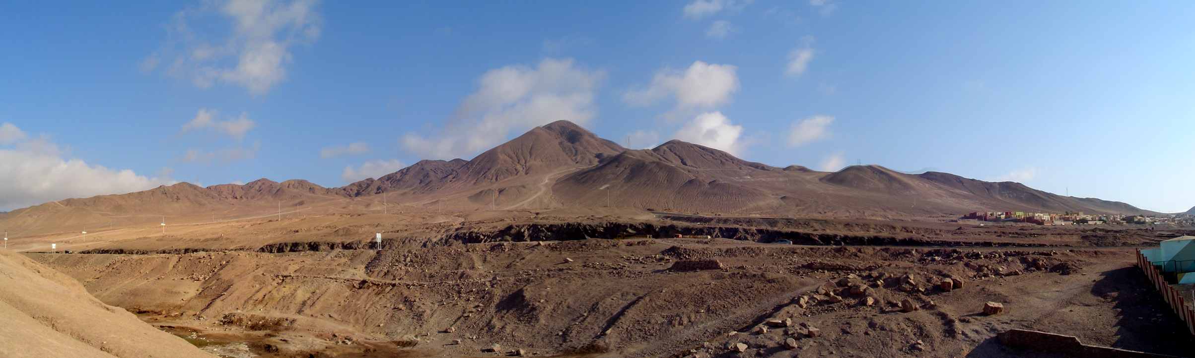 Quebrada El Carrizo, Avenida de La Minería (Ruta 28) y la parte de la población Jardines del Sur.